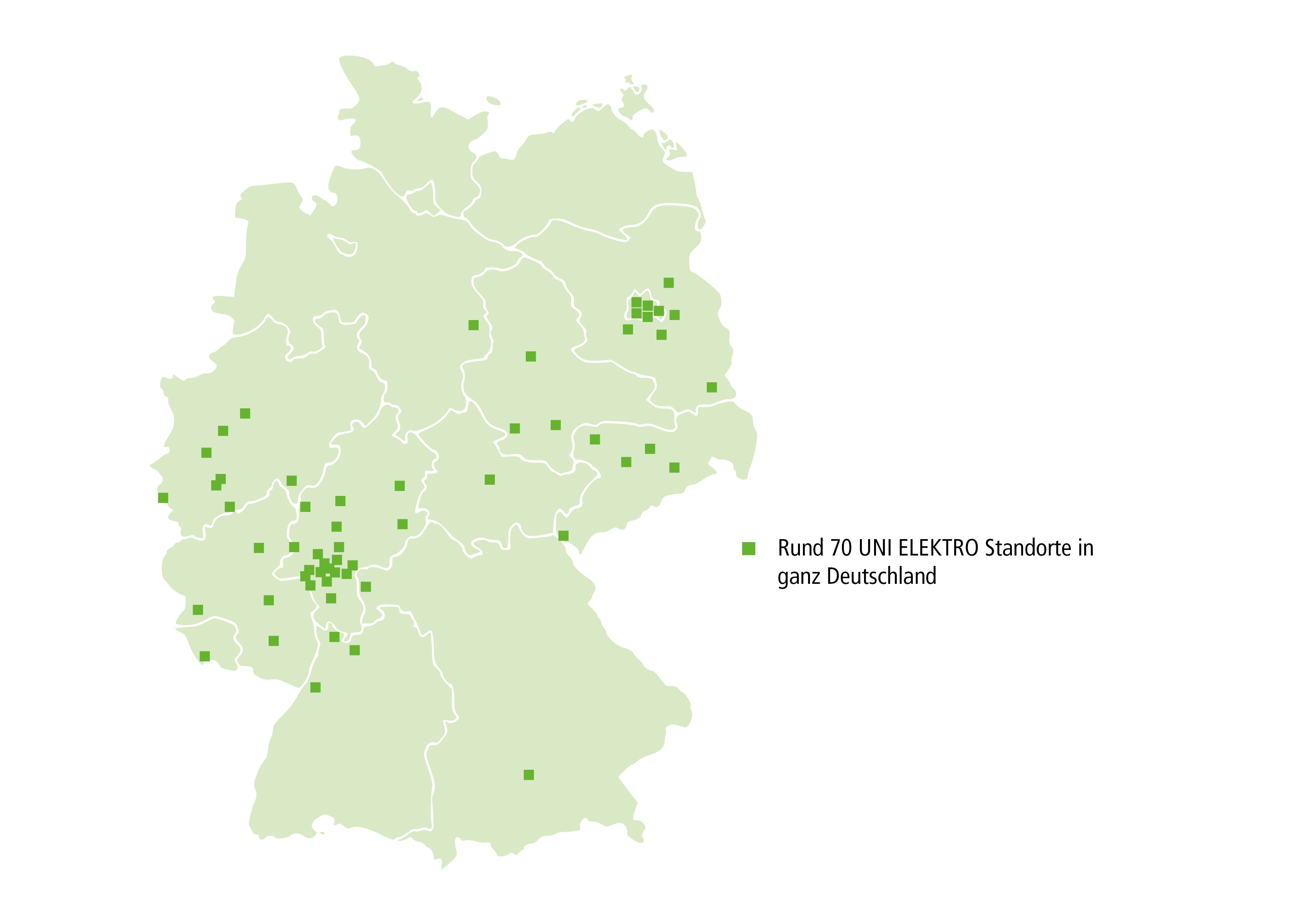 UNI ELEKTRO Standortkarte